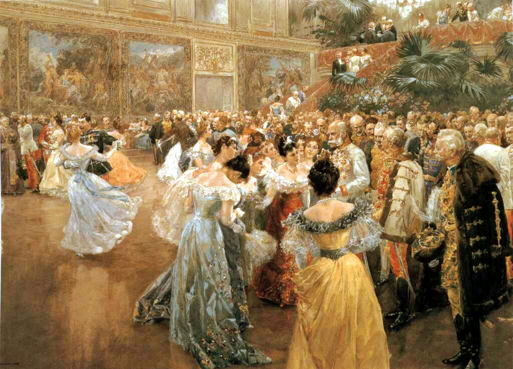 Hofball in Wien. Aquarell, 49.8 x 69.3 cm